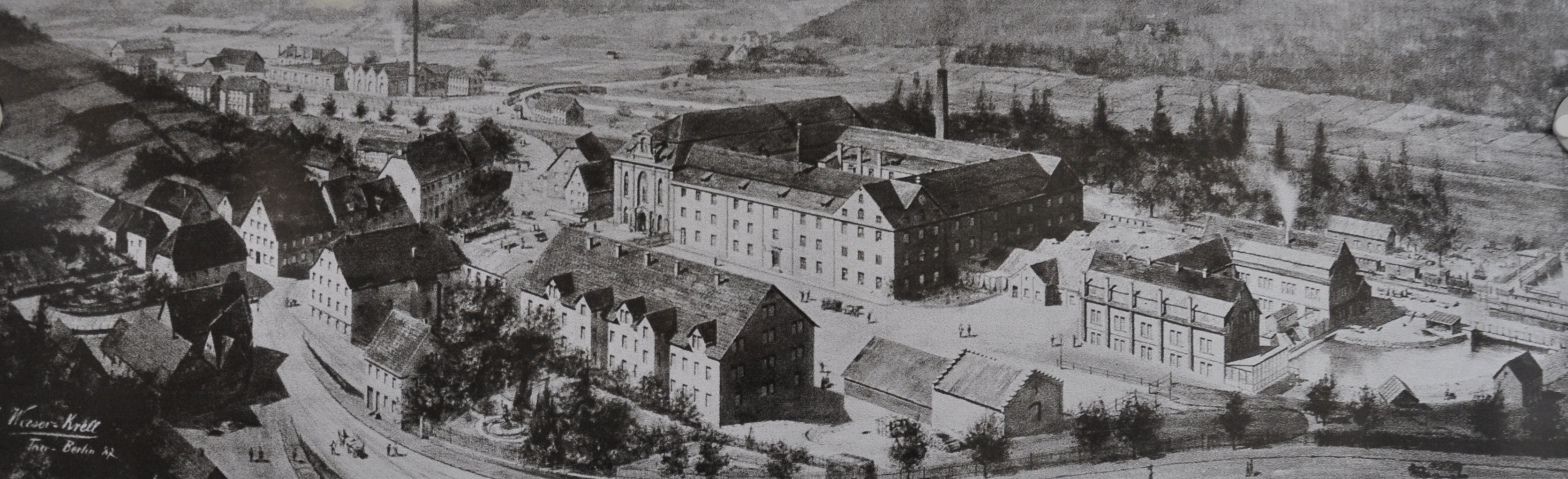 Waffenfabrik Mauser im ehemaligen Augustinerkloster Oberndorf (Ausschnitt aus einem Gemälde von Jakob Weeser-Krell)